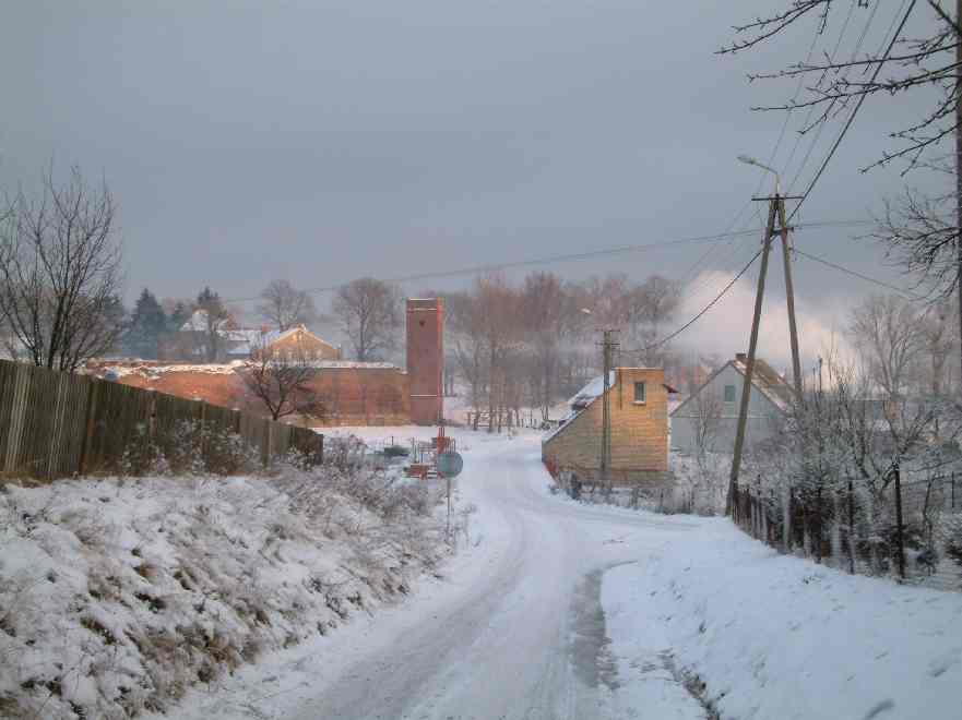 Zamek Kiszewski - zima 2003 - Stako